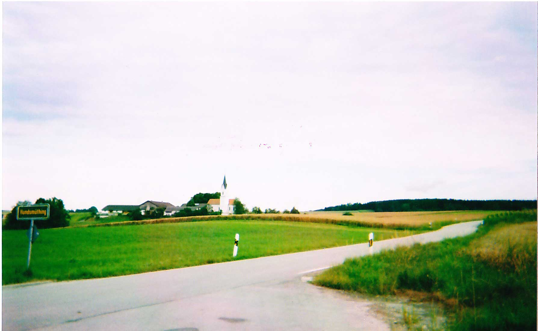 Staffing von Südosten